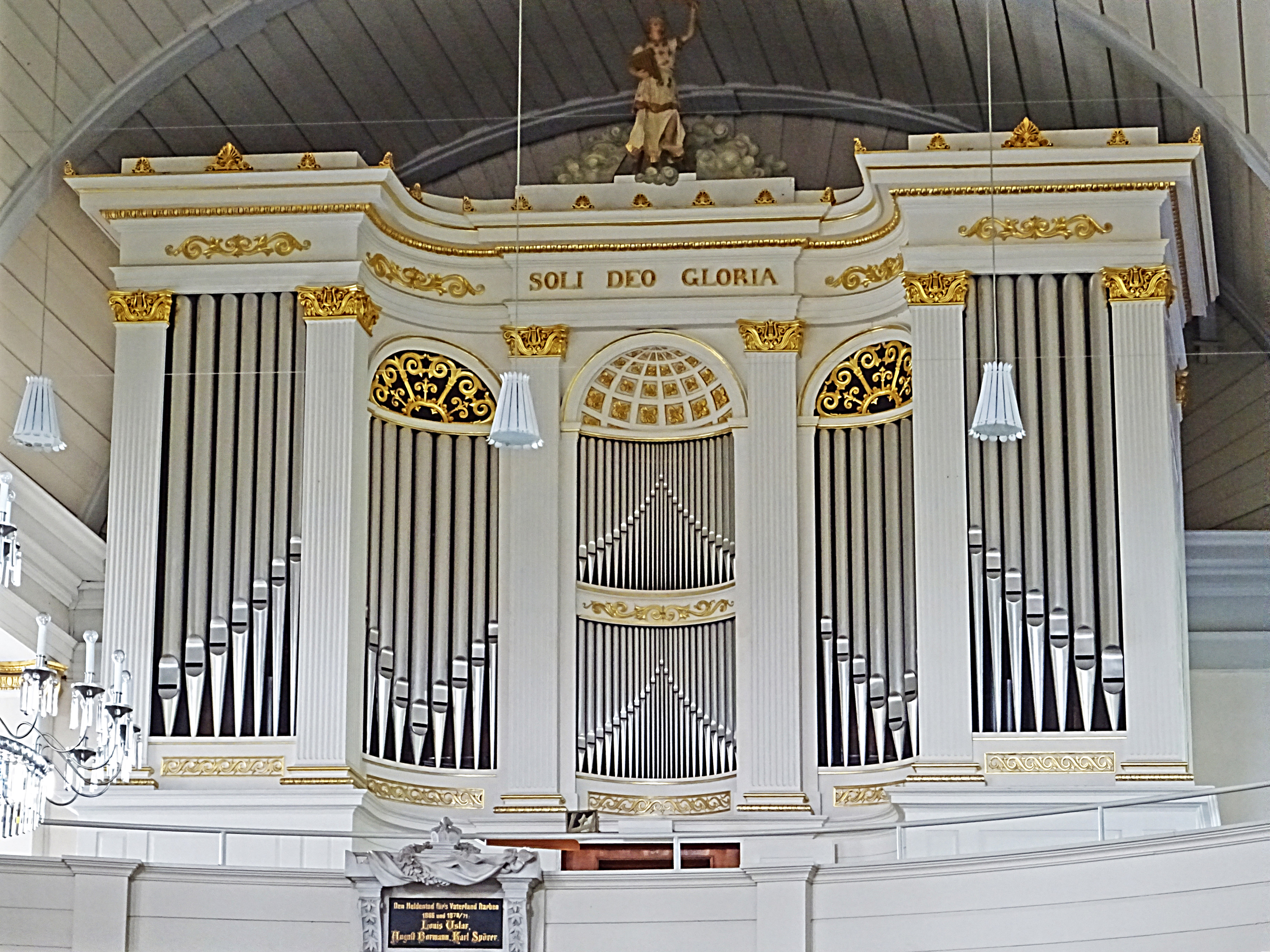 Orgel von Johann Andreas Engelhardt (1845, II/P36) in der Nicolaikirche (Herzberg am Harz)